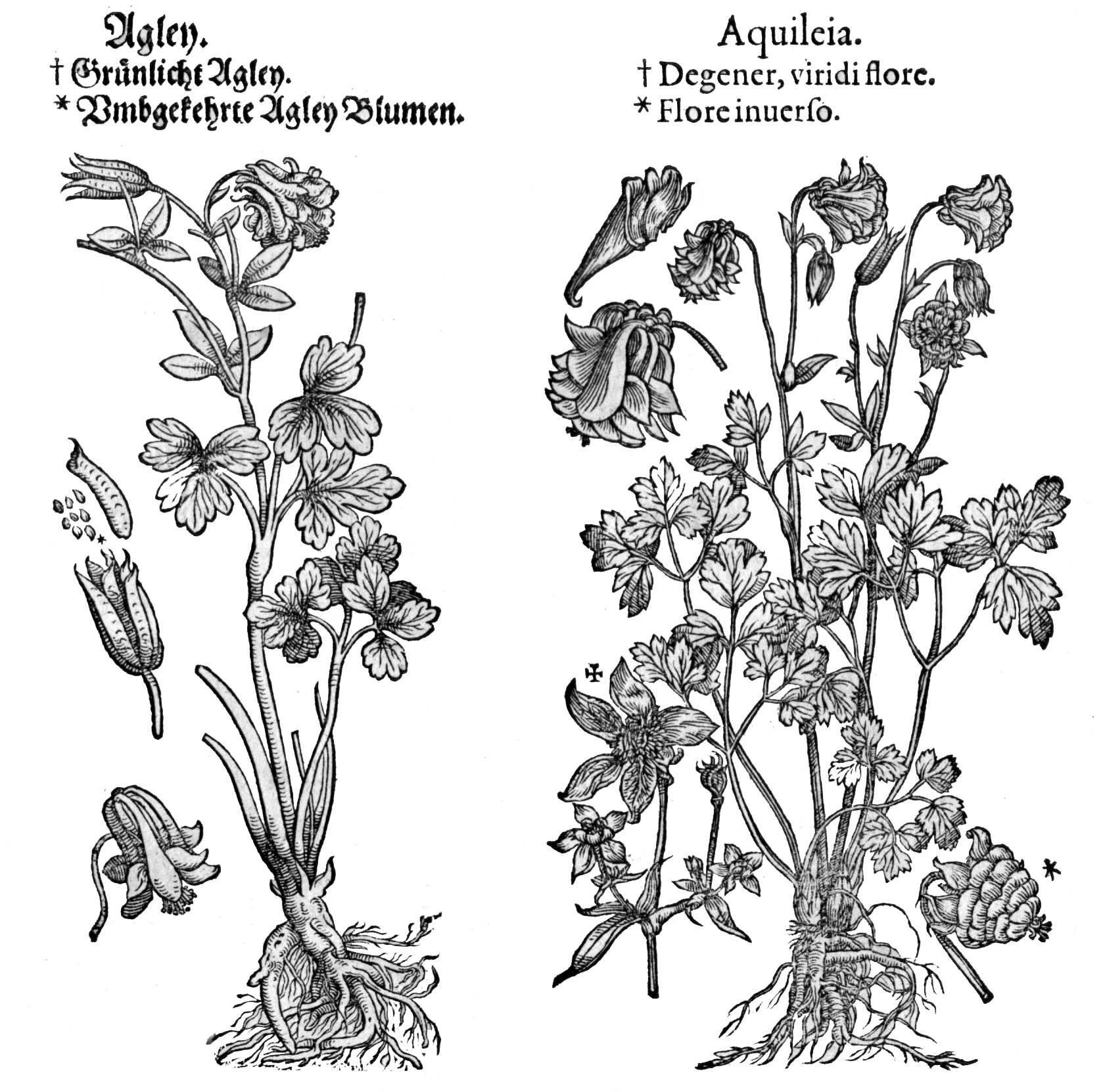 Abbildung von Akelei-Arten mit gefüllten Blüten